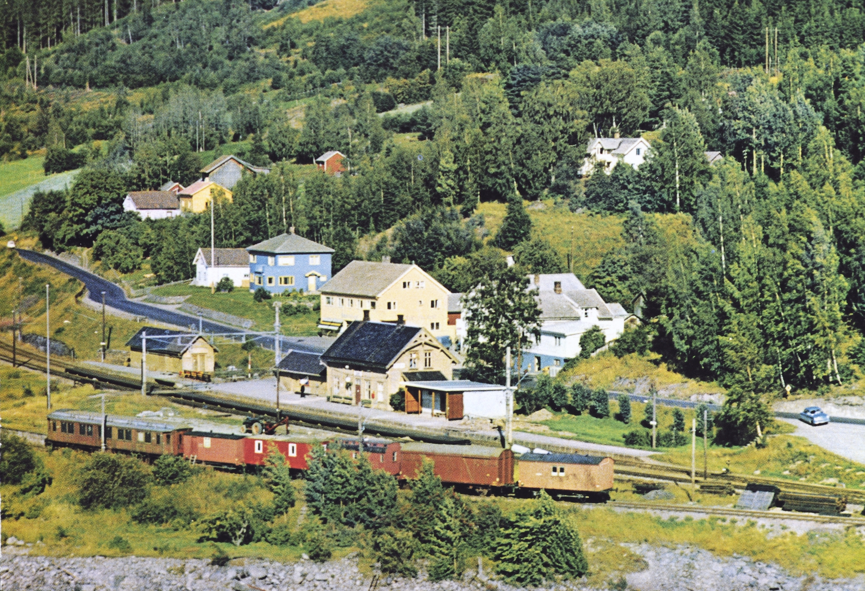 Espa stasjon ved Mjøsa ca. 1965. Den gamle stasjonsbygningen ble revet i 1966. Det nye ekspedisjonsbygget er satt opp ved siden av.